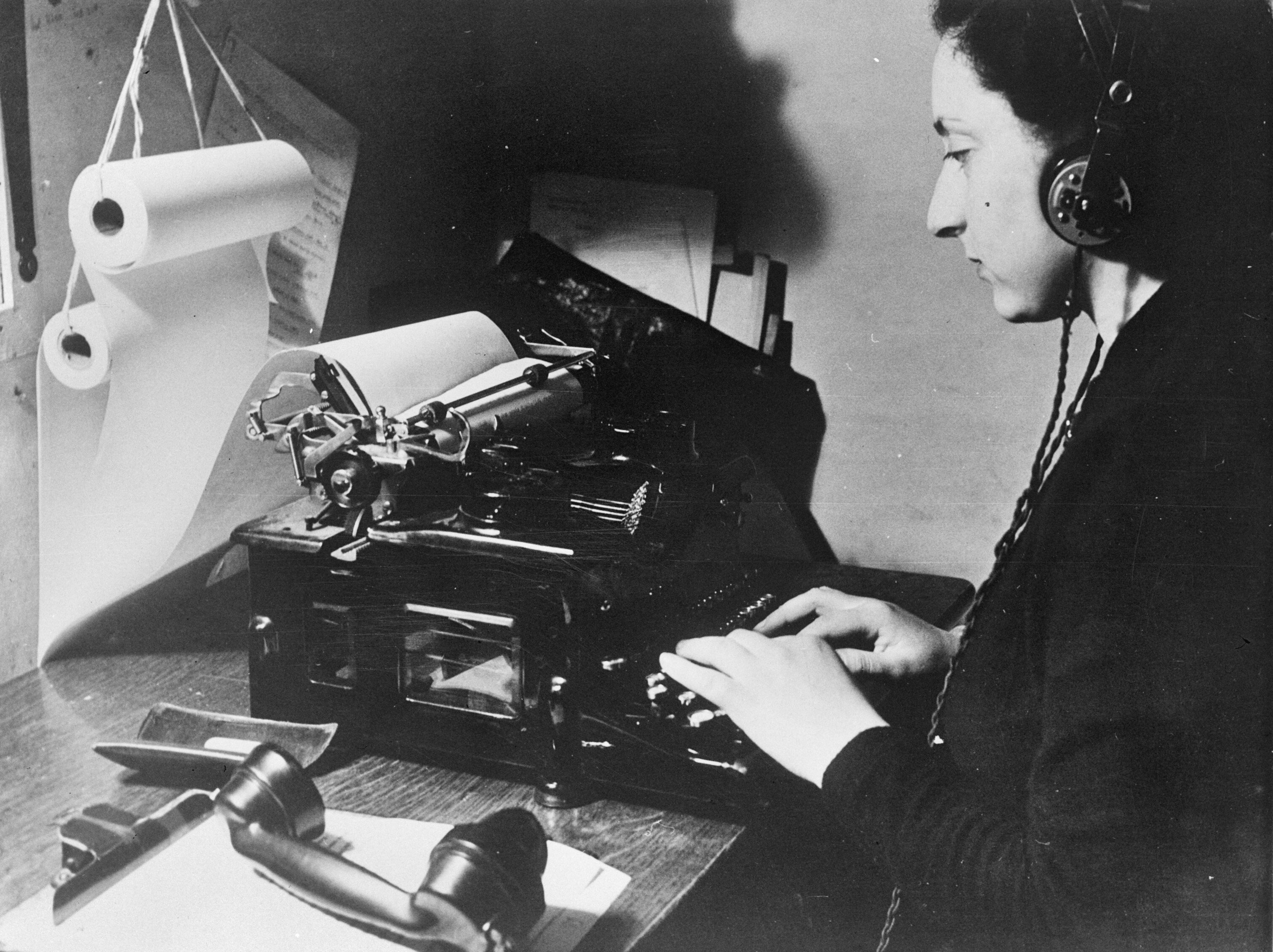 Collectie / Archief : Fotocollectie Anefo Reportage / Serie : HIE [Holland in England] / Anefo Londen serie Beschrijving : Het vrije Nederlandse persagentschap ANEP-ANETA begon met haar werkzaamheden één week na de bezetting van Nederland.. Het agentschap heeft kantoren in het gebouw van het Engelse ministerie van Informatie, bij Reuters Londen, in Willemstad (Curaçao), Paramaribo (Suriname) en in Lissabon en claimt het nieuwsagentschap te zijn met 's-werelds langste communicatielijn Datum : april 1942 Locatie : Groot-Brittannië, Londen Trefwoorden : schrijfmachines, tweede wereldoorlog Persoonsnaam : anep-aneta, j van den bogaert Fotograaf : Onbekend / Publiek Domein Auteursrechthebbende : Nationaal Archief Materiaalsoort : Negatief (zwart/wit) Nummer archiefinventaris : bekijk toegang 2.24.01.04 Bestanddeelnummer : 935-1770